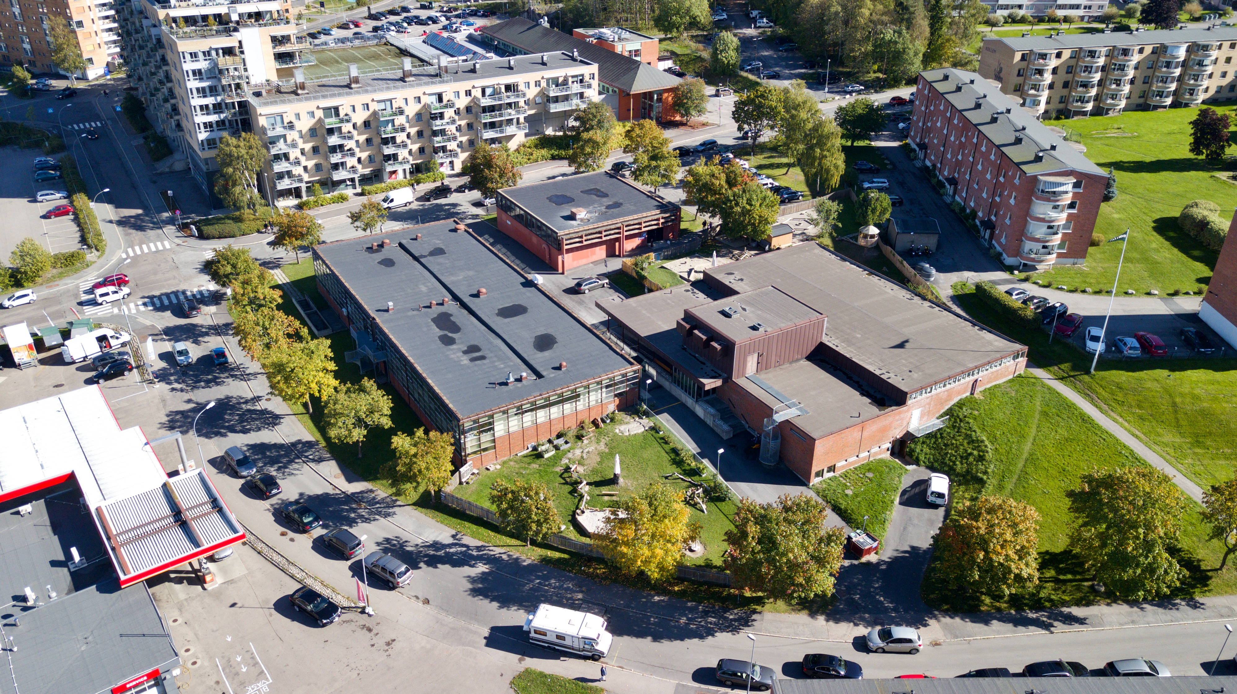 Bøler samfunnshus, bibliotek og bad - Bølerlia 3. Bøler i Oslo.